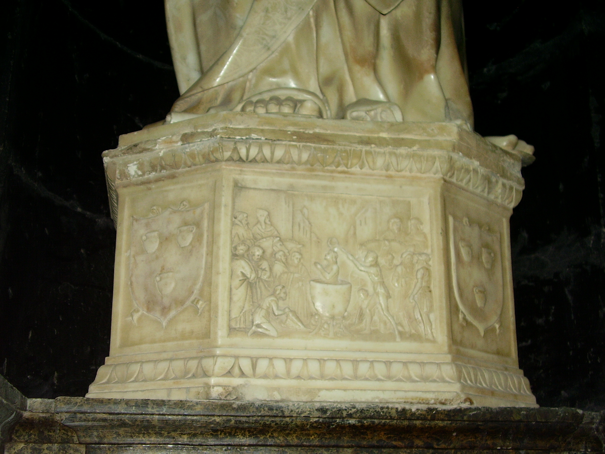 Base di una delle statue del trittico rinascimentale di Antonello Gagini, Vibo Valentia, duomo di Santa Maria Maggiore e San Leoluca